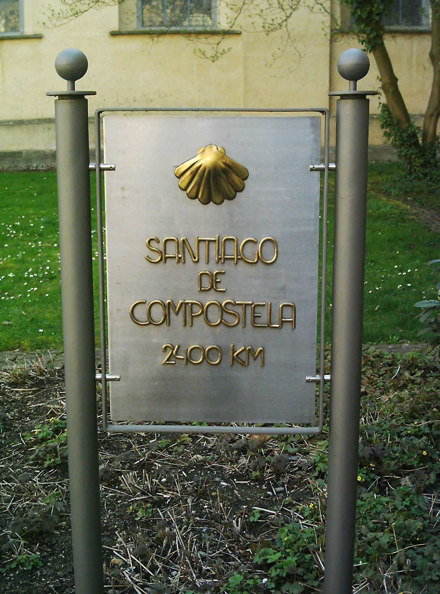 Santiago Pilger-"Kilometerstein" im Innenhof des Benediktinerklosters Weingarten in Weingarten (Württemberg), Oberschwaben, Lkr. Ravensburg, Deutschland